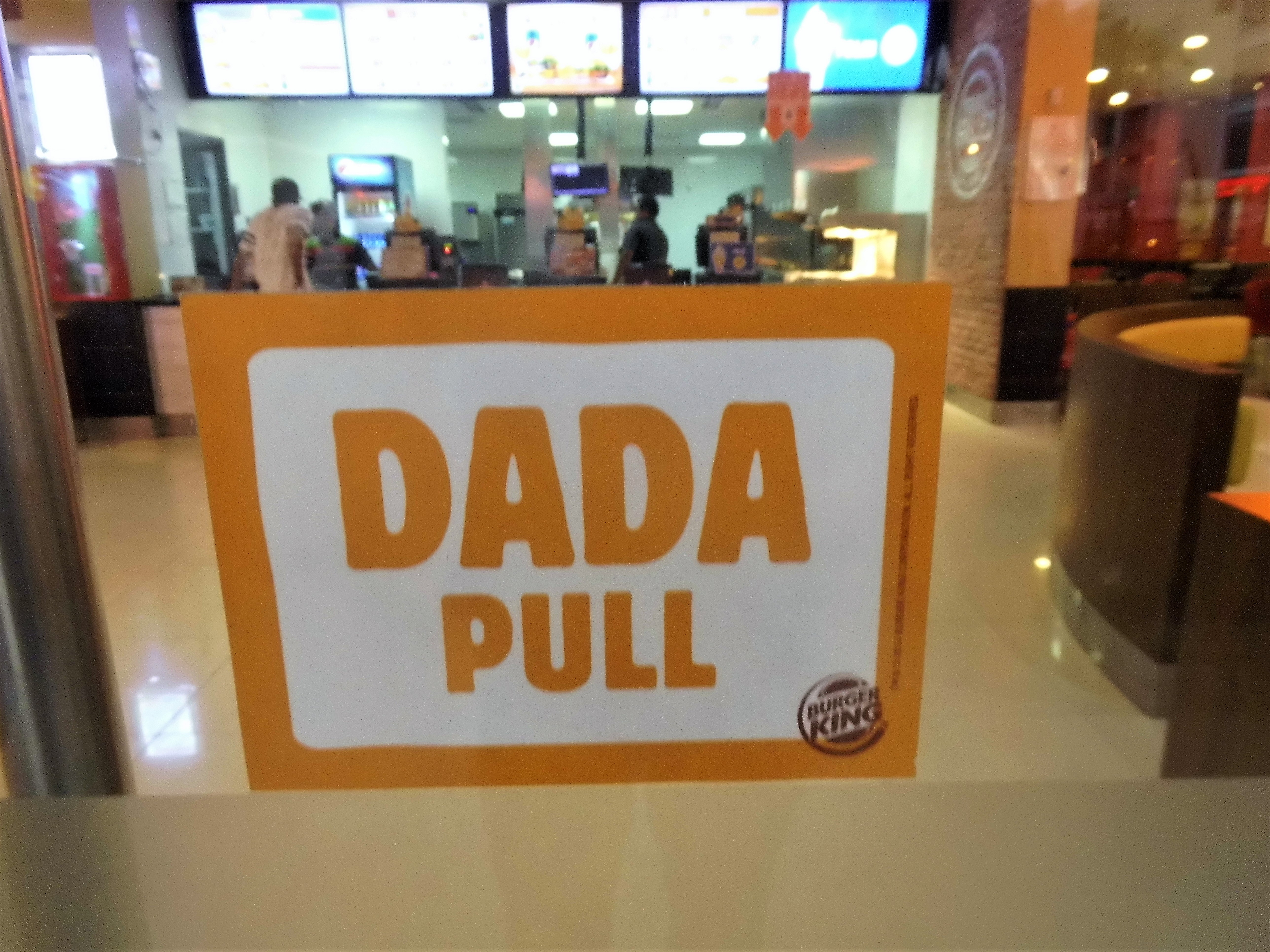 Timor Plaza